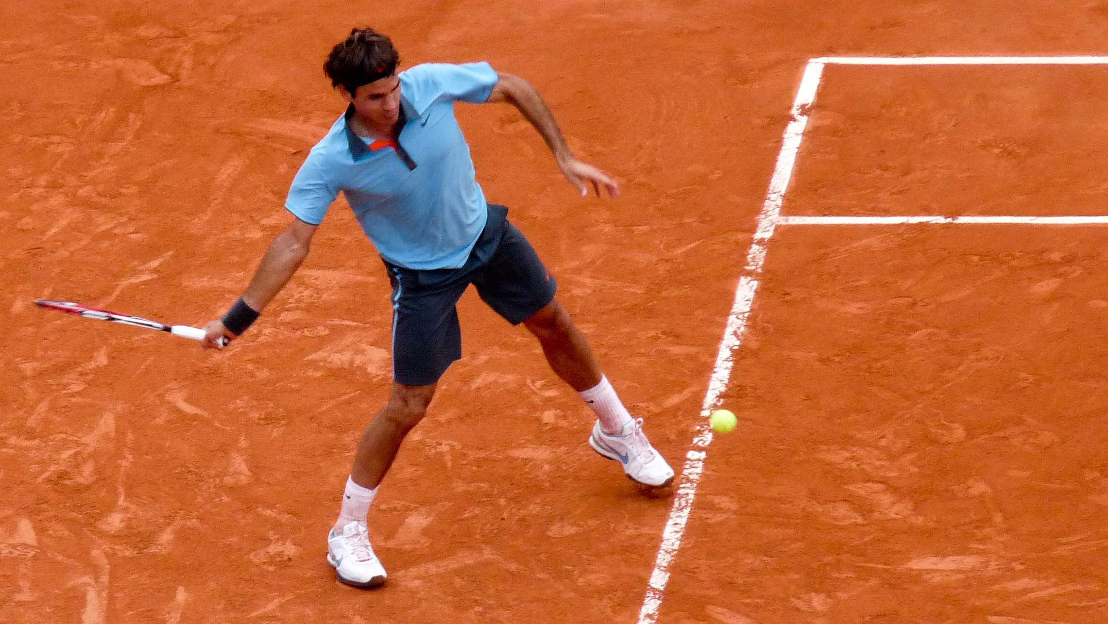 Roger Federer against Juan Martín del Potro in the 2009 French Open semifinals